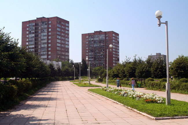 Náměstí v Glazově